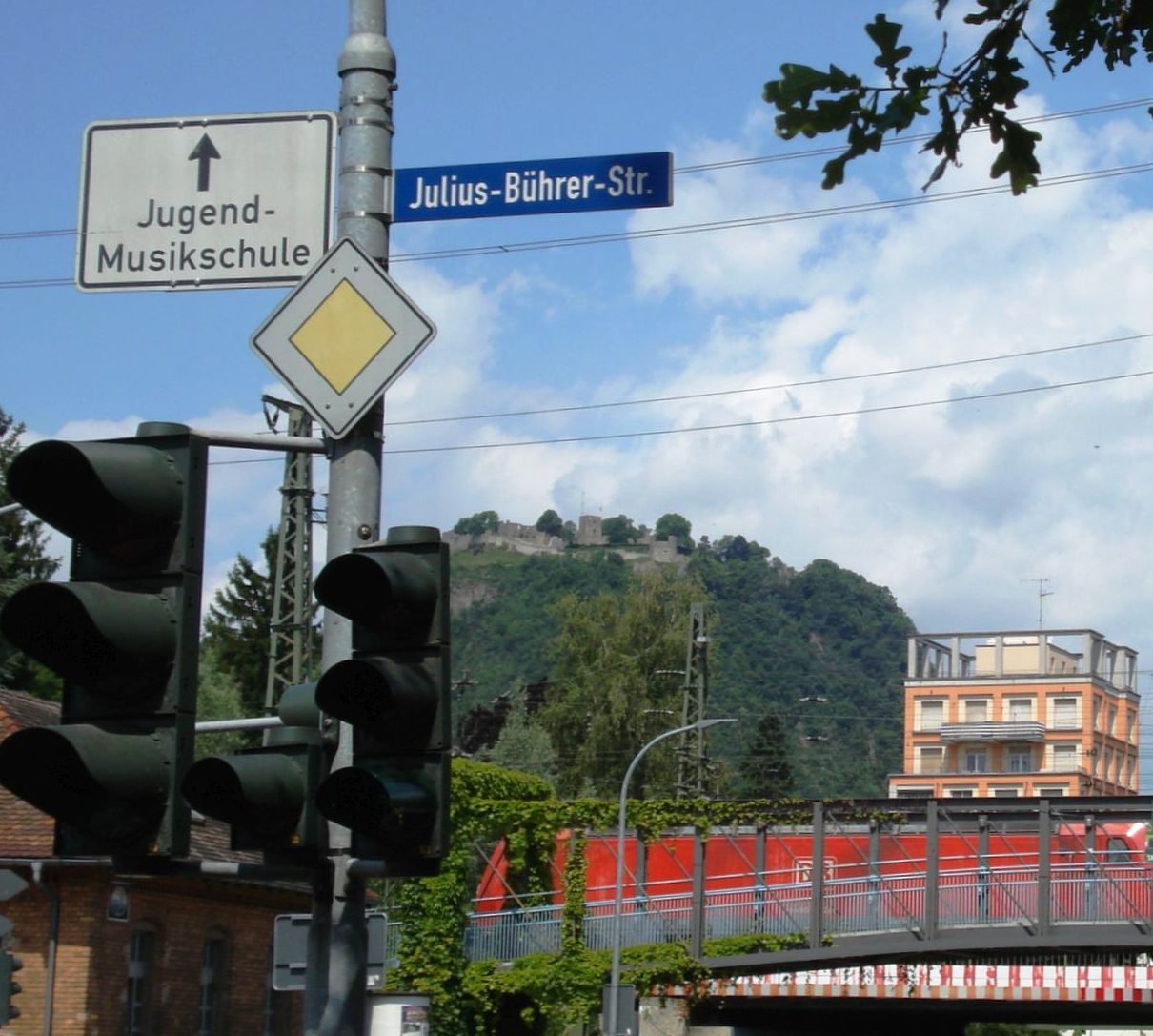 Mit dieser Straßenbenennung in Singen werden die Verdienste von Julius Bühler gewürdigt.